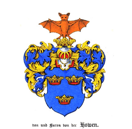 Wappen der Familie von der Howen bei Klingspor